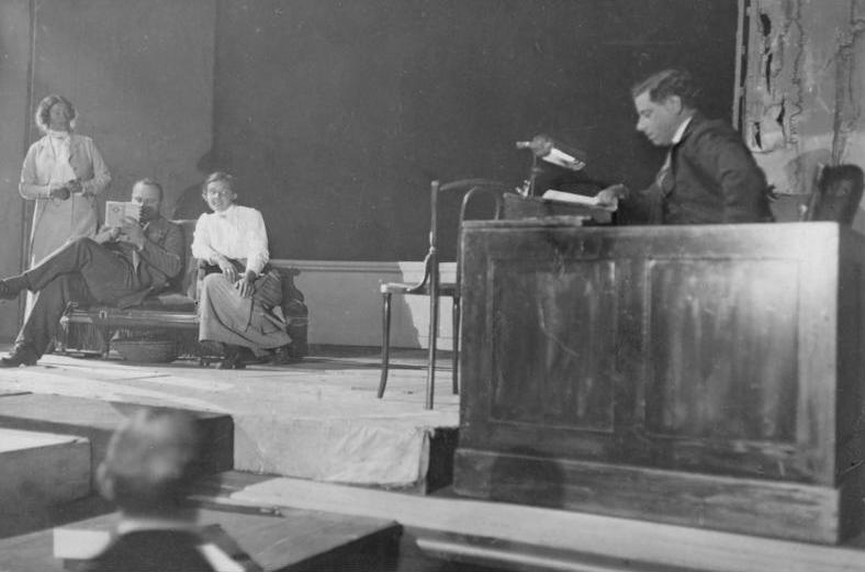 Berlin, Max Reinhardt bei einer Probe Scherl Bilderdienst Vom Beginn der Theatersaison in Berlin. 1913 Max Reinhardt bei einer Probe von "Torquato Tasso". 1. Max Reinhardt. 2. Else Heims (Prinzessin). 3. Eduard von Winterstein (Alfonso). 4. Leopoldine Konstantin (Leonore). 18569-13 Abgebildete Personen: Heims, Else: Schauspielerin, Deutschland Konstantin, Leopoldine: Schauspielerin, Deutsches Theater Berlin, Reinhardt, Max Prof. Dr.: Intendant, Regisseur, Schauspieler, Direktor Deutsches Theater Berlin, Deutschland Winterstein, Eduard von: Schauspieler, Deutsches Theater Berlin, Schillertheater, DDR (GND 118633864)